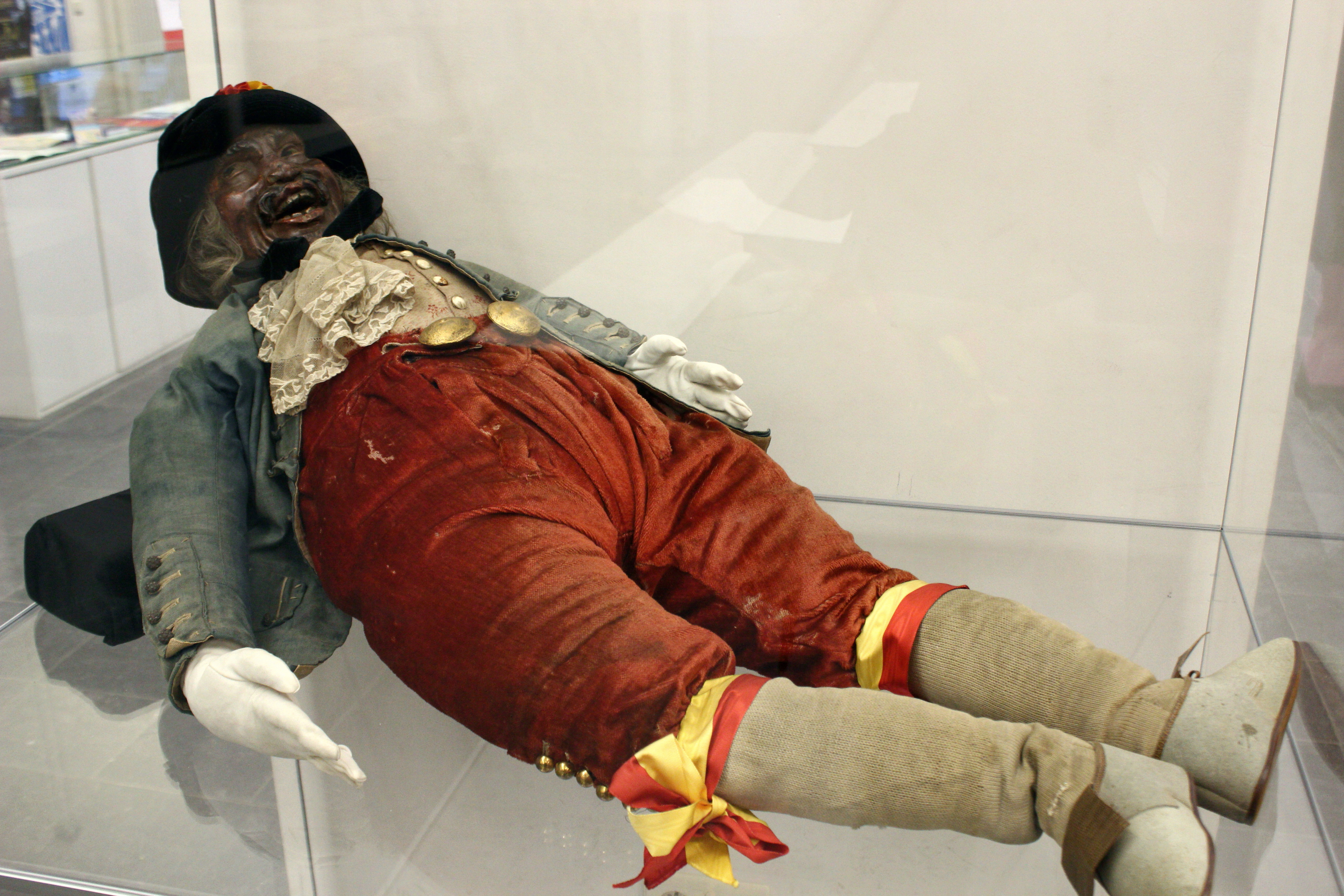 Opsinjoorke. Deze pop is een Mechels folkloristisch figuur